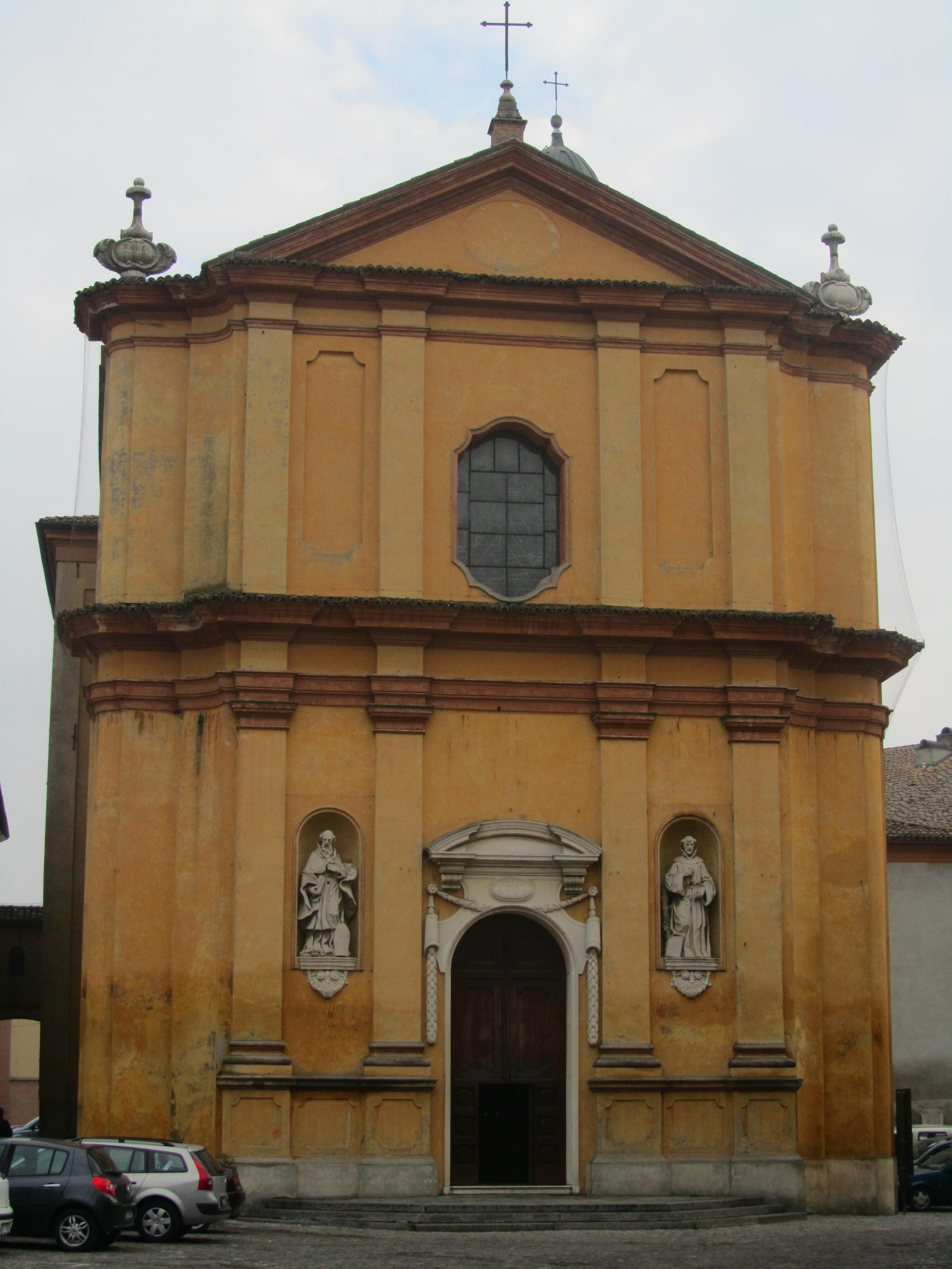 La chiesa di Sant'Andrea a Castelnovo di Sotto, provincia di Reggio Emilia.